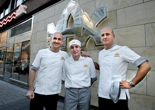 Rikard Bergfors (VD Max) ,Lars Andersson och Christofer Bergfors (Vice VD Max) november 2007 efter presskonferans på Max Wasagatan. Där Samhall och Max skrev på samarbetsavtal.